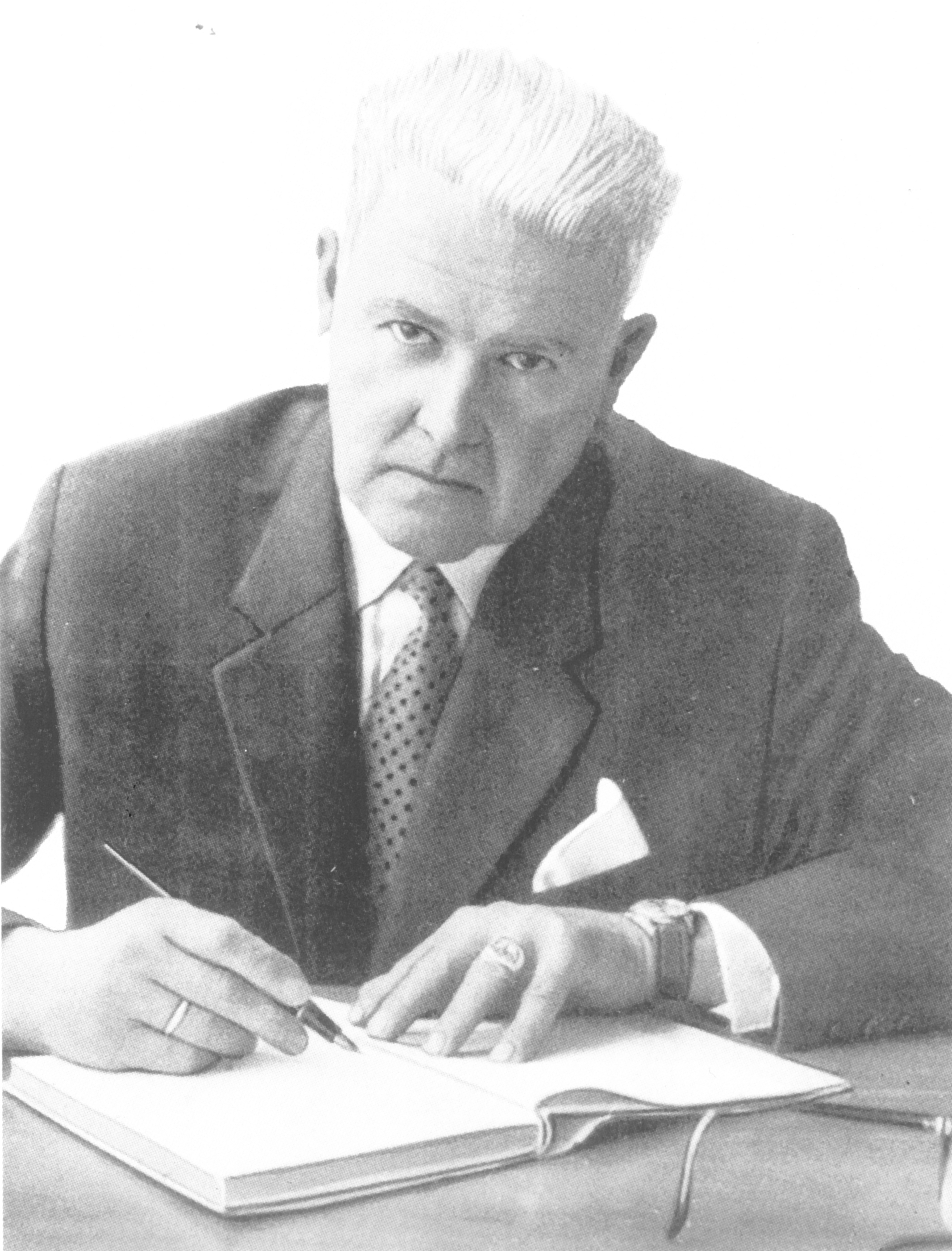 Max Reisch, österreichischer Forscher und Schriftsteller, 1960 Licensing --Peter Reisch 14:35, 13. Nov. 2008 (CET)